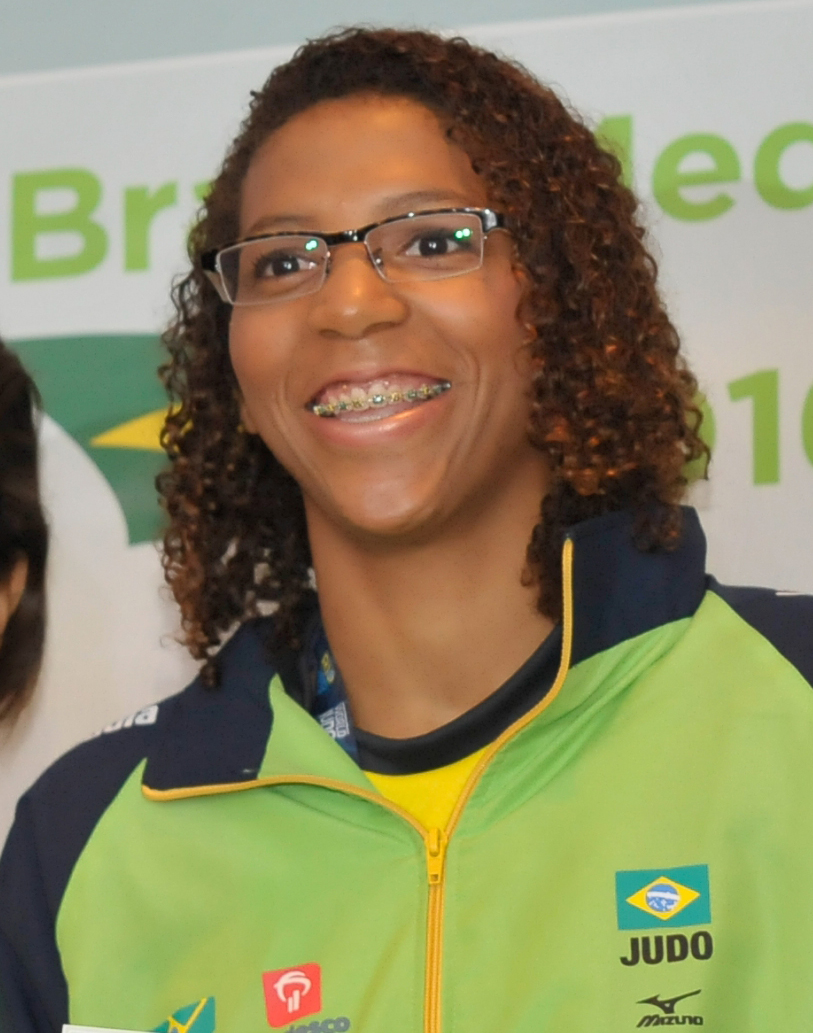 Rafaela Silva no Rio de Janeiro. Ministério do Esporte anuncia os 27 atletas contemplados pela Bolsa Atleta Pódio.